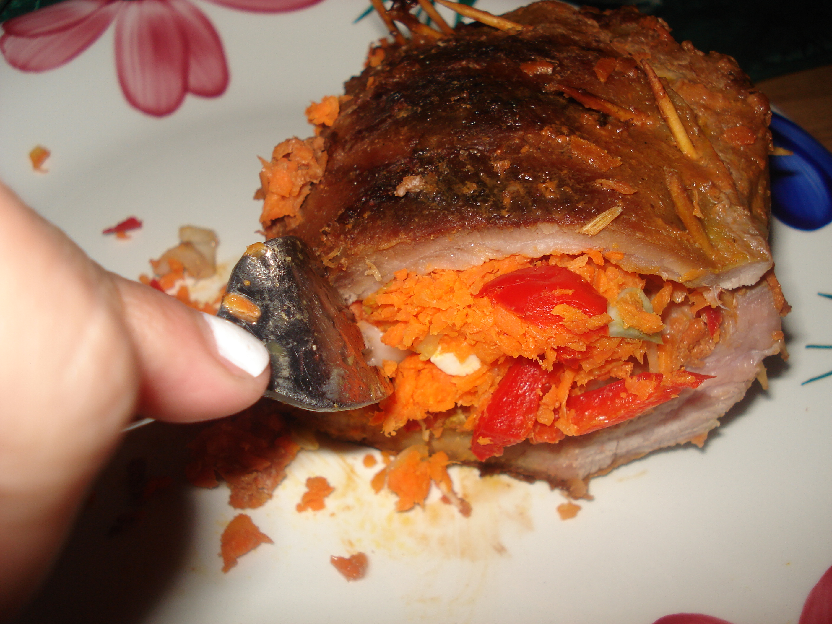 Matambre relleno al medio cocinado a la parrilla.